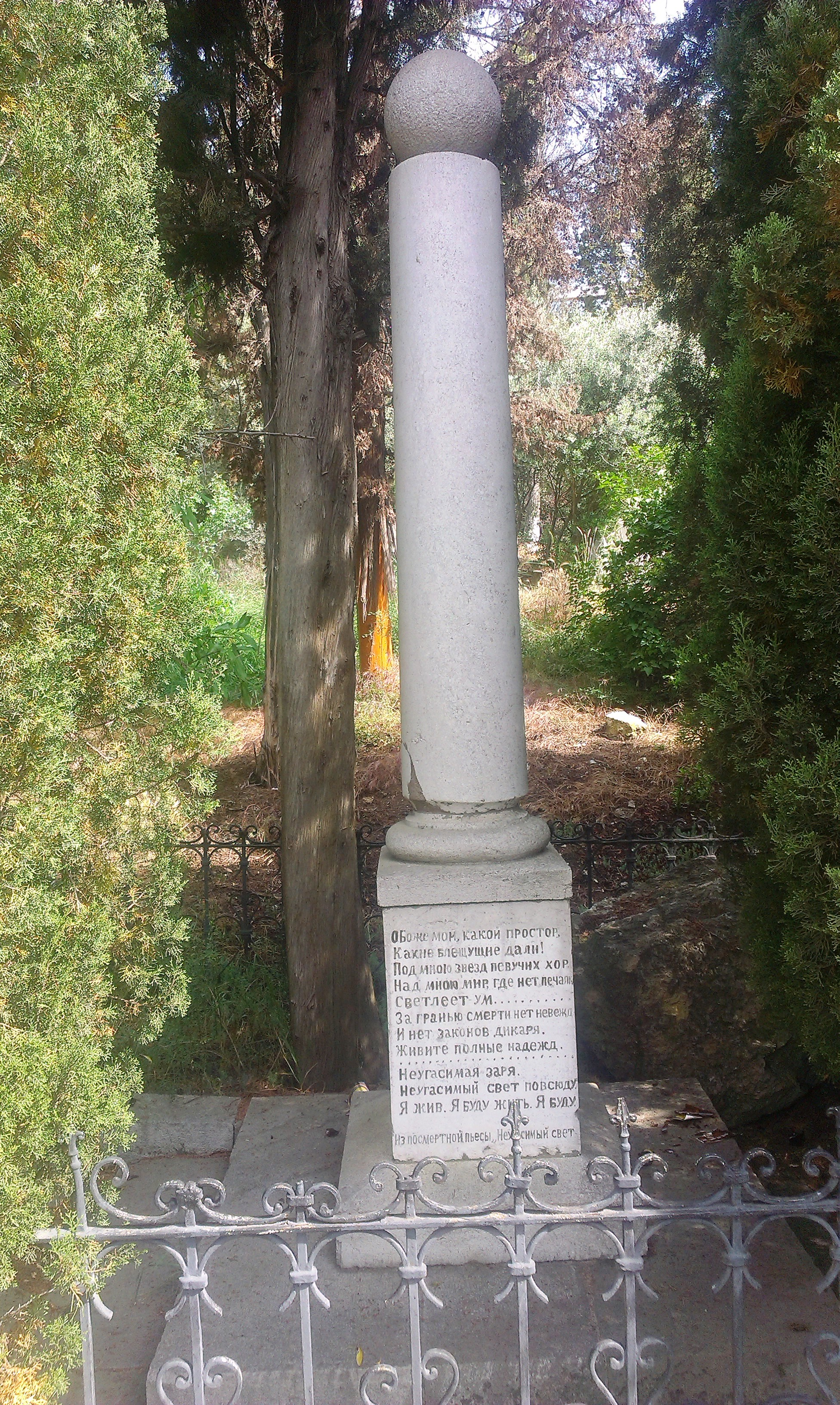 Поликуровский мемориал. Могила писателя Сергея Найденова